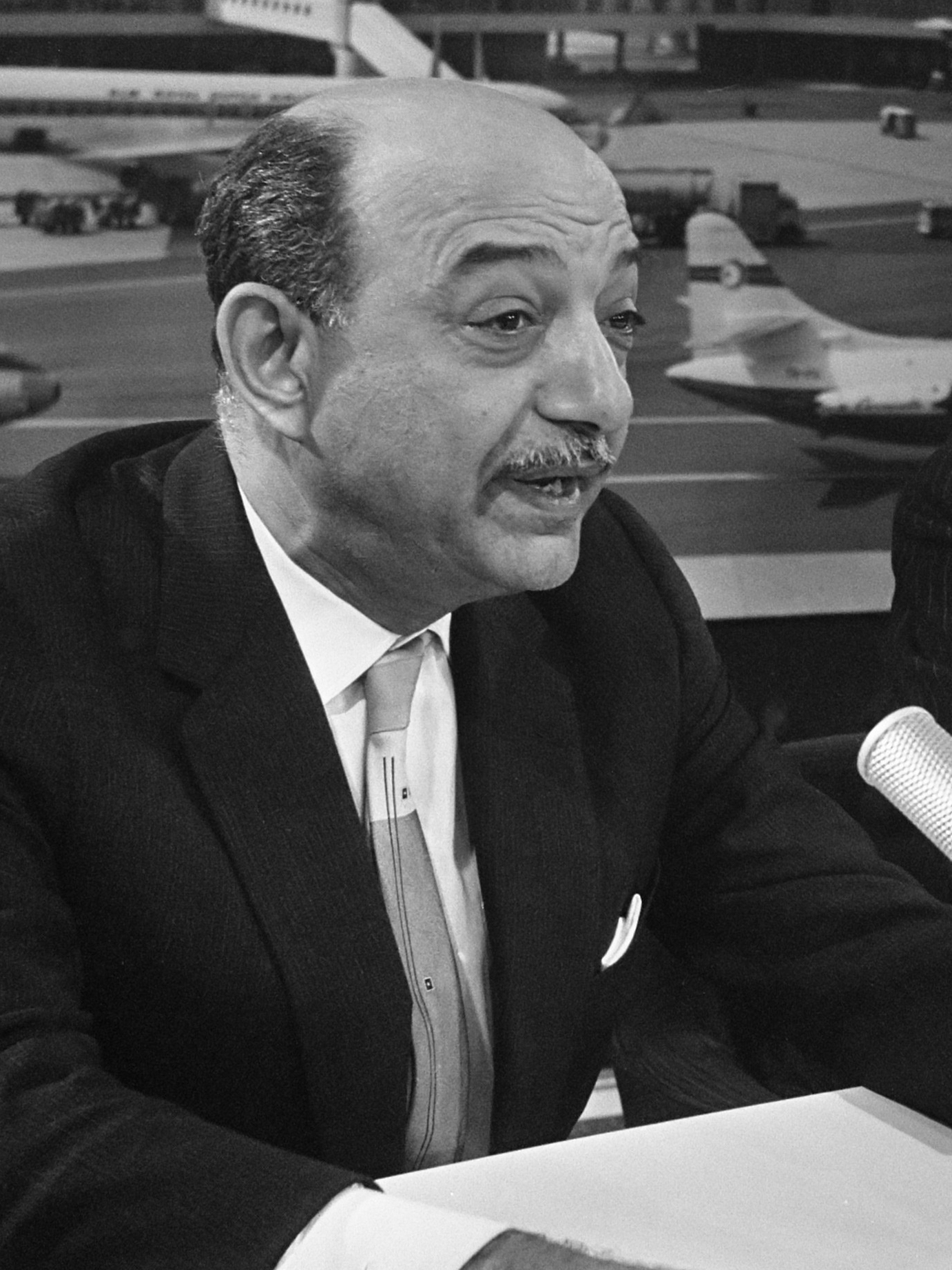 Bezoek van Mahmoed Riad, minister van Buitenlandse Zaken van de VAR Egypte; Mahmoed Riad tijdens de persbijeenkomst op Schiphol